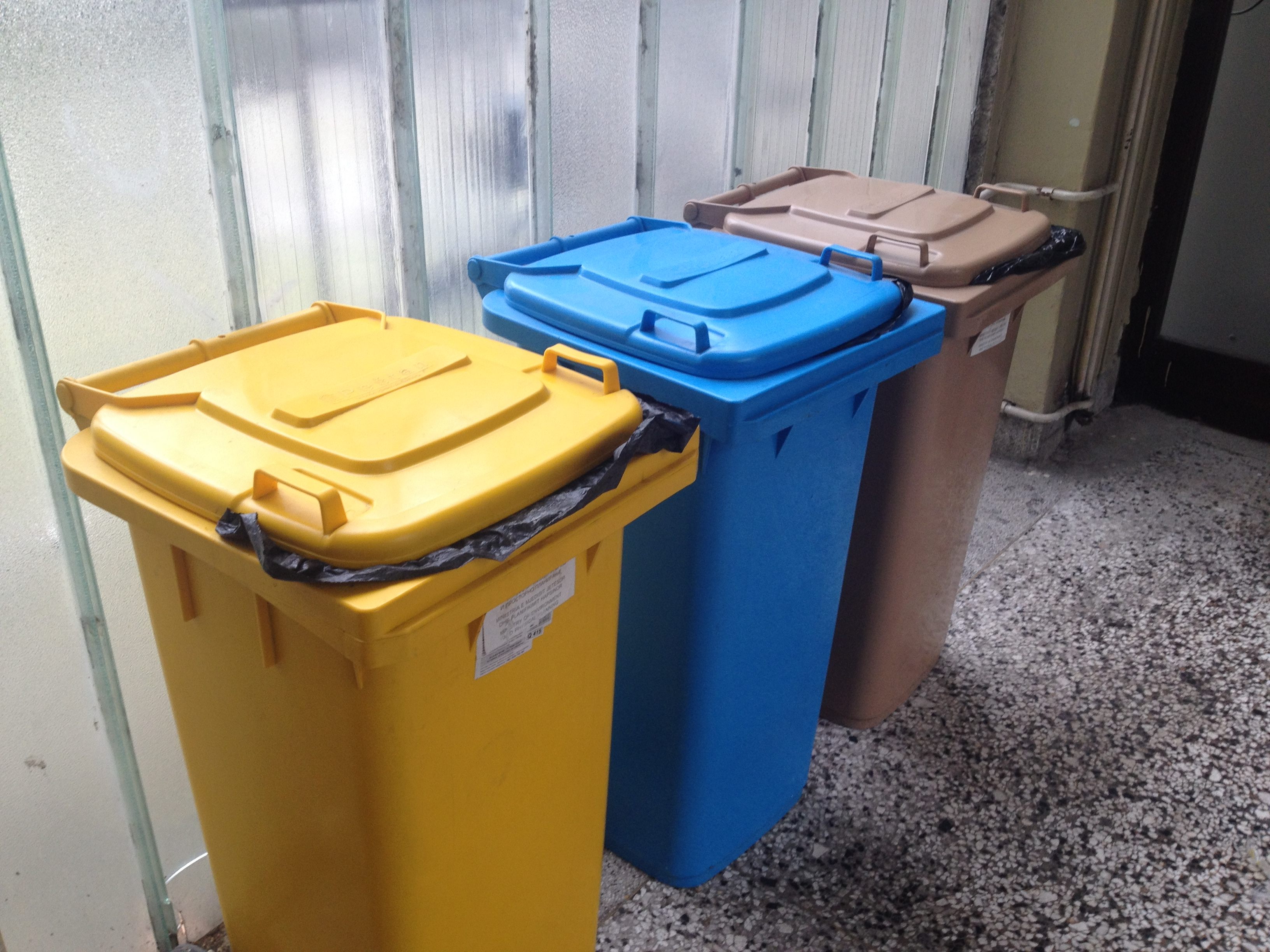 Орце Николов го активно поддржува рециклирањето и класифицирањето на отпадот.